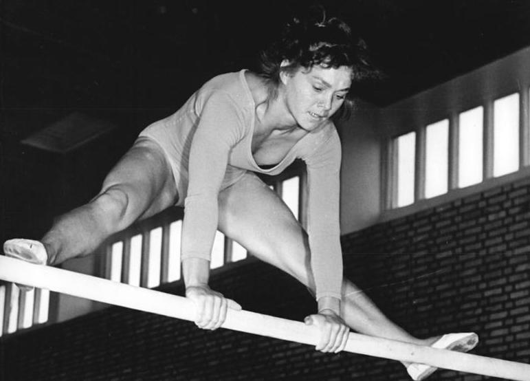 Christel Felgner Zentralbild Kohls-Studré Ks-Zi 25.6.1964 Turnen: DDR-Aufgebot für Olympia-Ausscheidungen. Für die Olympia-Ausscheidungen mit den Turnerinnen Westdeutschlands am 27. und 28. Juni 1964 in Wolfsburg, sowie am 18. und 19. Juli 1964 in Schwerin hat der Deutsche Turnverband der DDR folgende Aktive nominiert: Erika Barth, Ute Starke (beide SC Leipzig), Birgit Radochla, Ingrid Föst, Rosemarie Heritz, Karin Hannewitz, Brigitte Sax (alle SC Dynamo Berlin), Christel Felgner und Barbara Stolz (beide SC Chemie Halle). UBz: Christel Felgner turnt am Stufenbarren. (Studré)